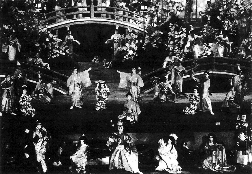 「第18回 秋のおどり」より「紅葉滝」の場面。 中央：川路龍子、中央右：小月冴子